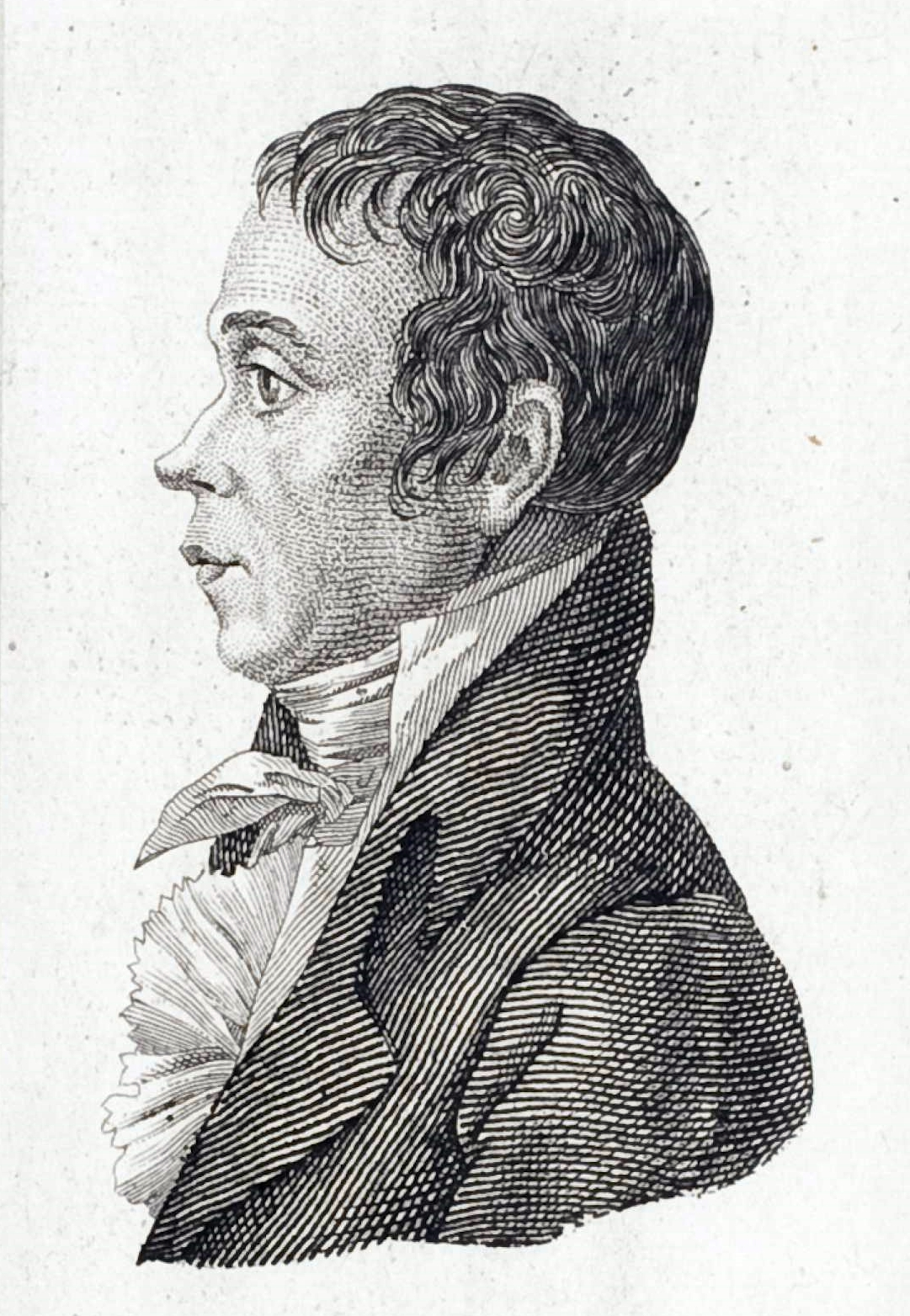 Johann Christian Friedrich Kühnau, eine Radierung von der Mitte des 19. Jahrhunderts